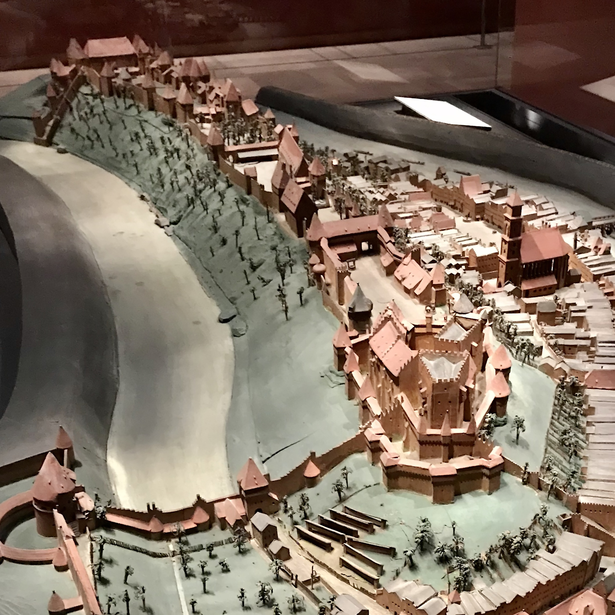 Burg zu Burghausen auf dem Stadtmodell von Jakob Sandtner von 1574 im Bayerischen Nationalmuseum